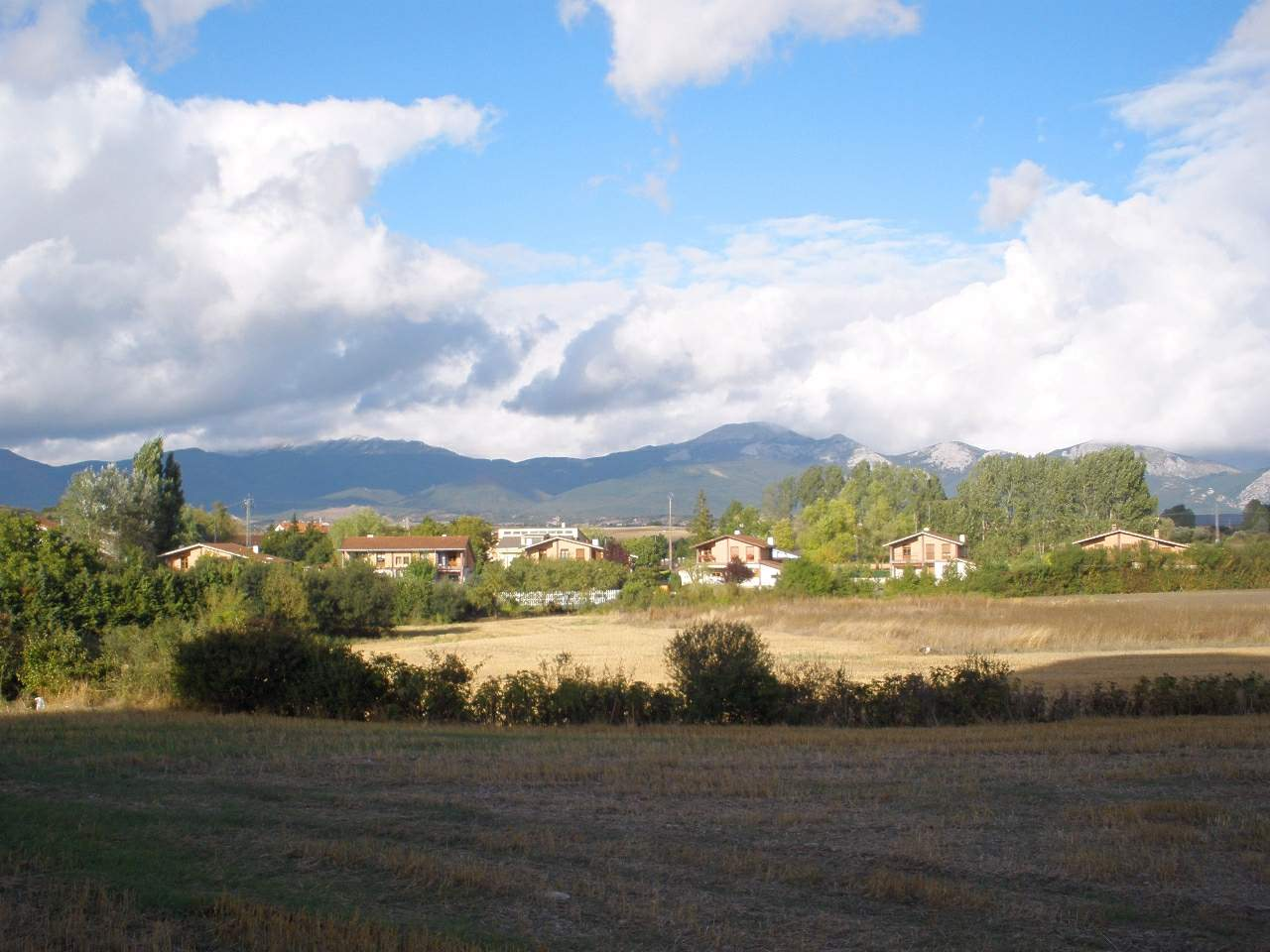 Salvatierra (Álava)